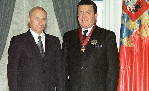 Награждение Иосифа Кобзона Орденом "За заслуги перед Отечеством" II степени